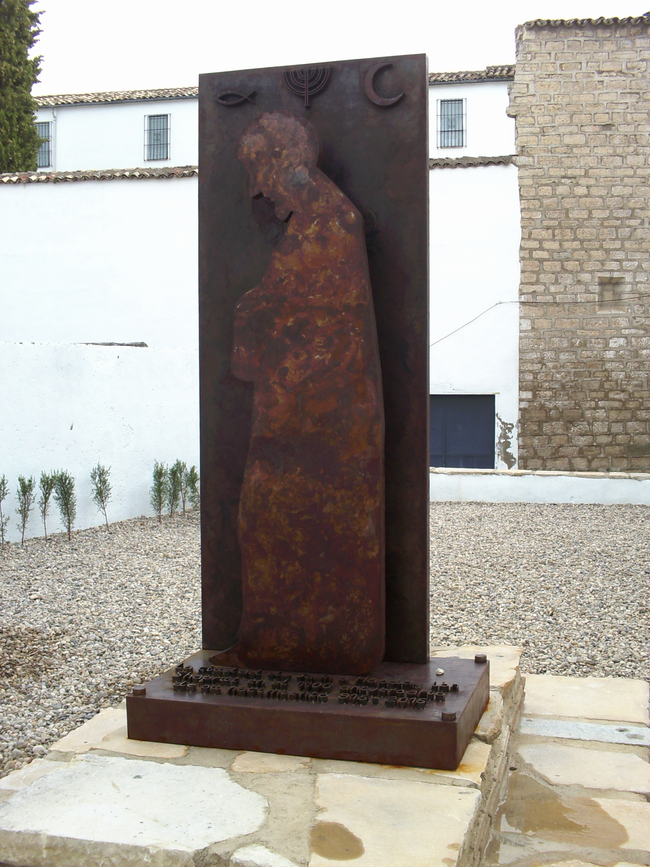 Monumento a Hasday ibn Shaprut, situado en la plaza del Rastro de Jaén. Obra del escultor Santiago Cano León, con motivo del XI centenario del nacimiento de ibn Shaprut (2016). Su inscripción reza lo siguiente: "La ciudad de Jaén a Hasday ibn Shaprut en el 1100 aniversario de su nacimiento 915-2015."